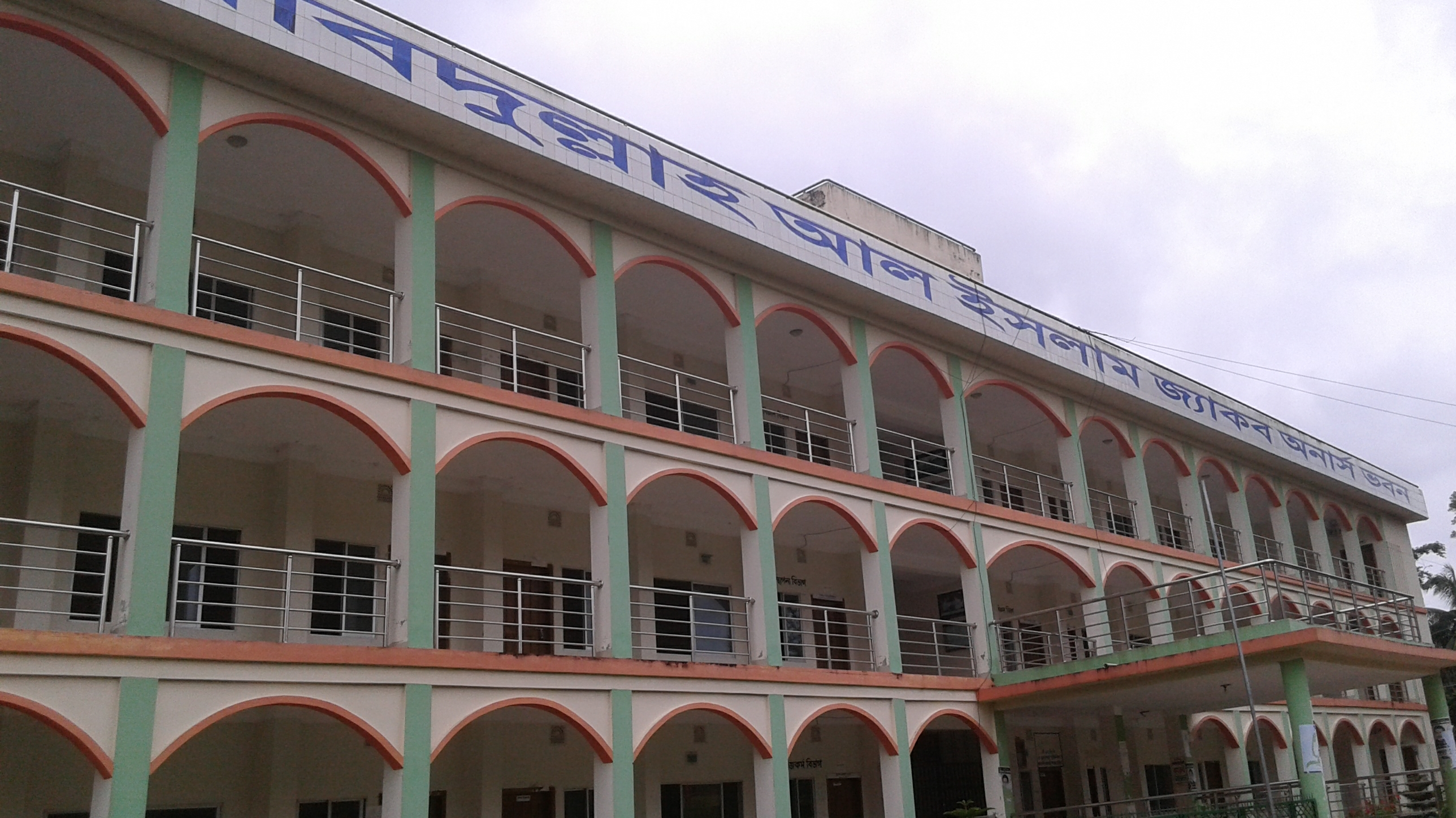 চরফ্যাসন সরকারি কলেজ অনার্স ভবন।এটি কলেজ মাঠ এর পশ্চিমে অবস্থিত